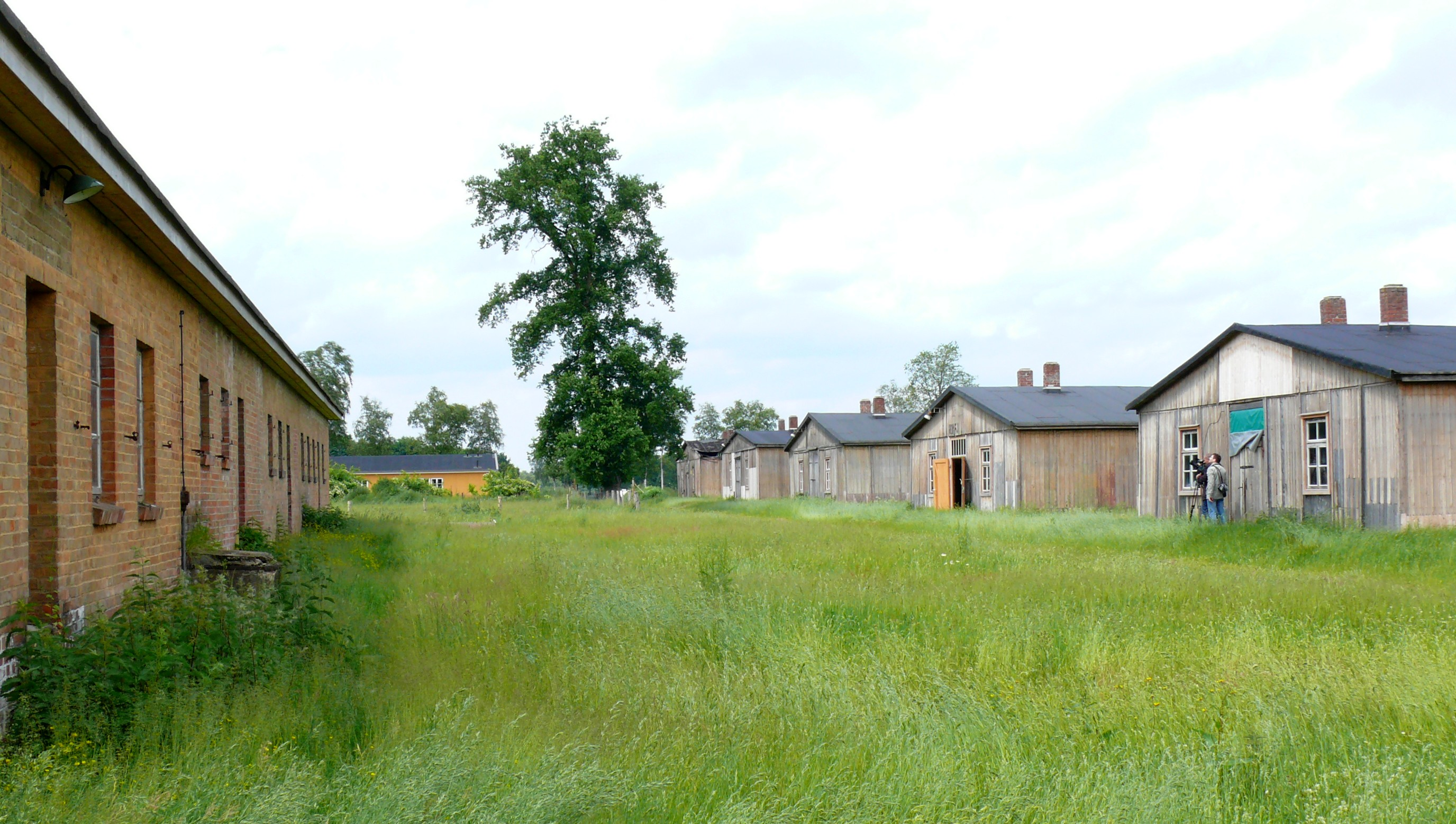 Gedenkstätte Stalag X B Sandbostel / Blick zwischen Latrinenbaracke (links) und Holzbaracken (rechts) auf die "Gelbe Baracke" (Informationen zum KriegsgefangenenLager)